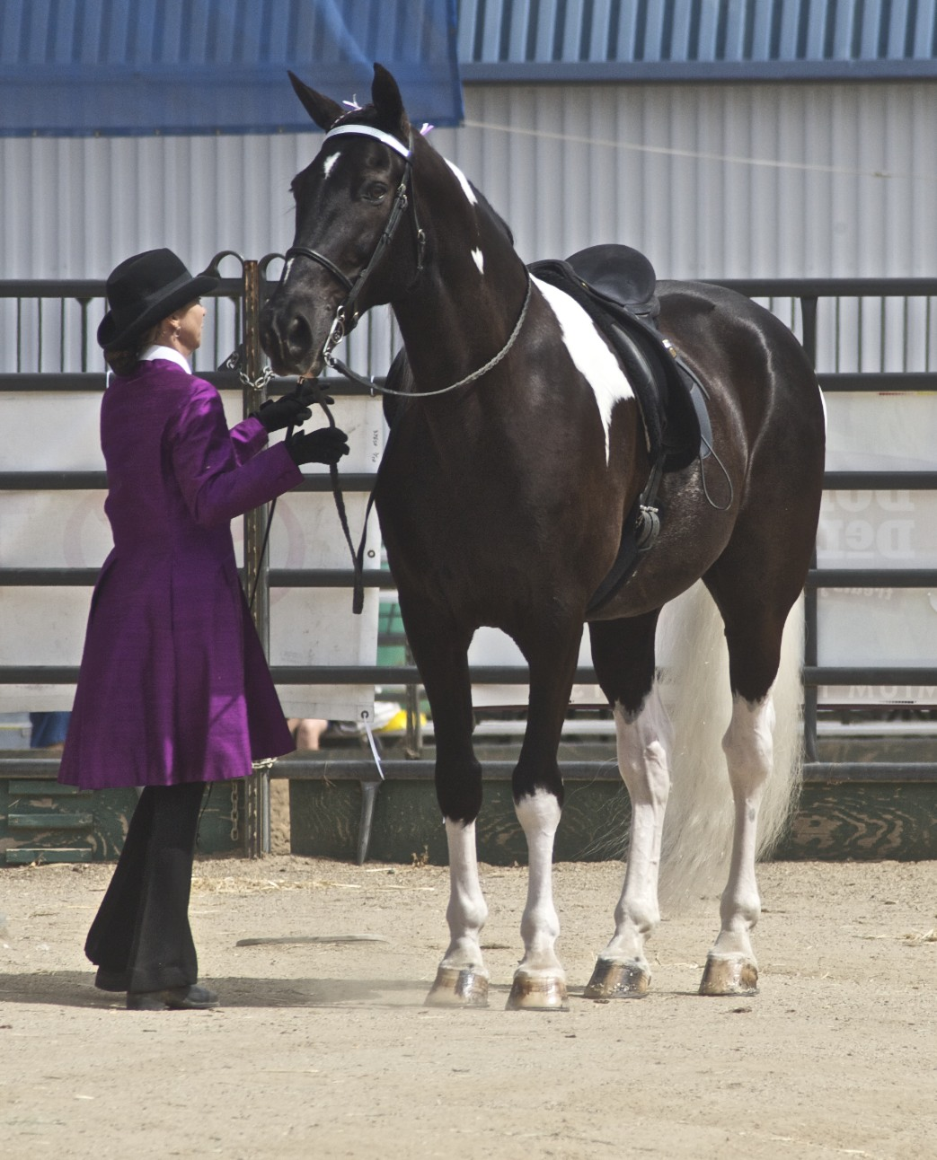 Spotted Saddle Horse